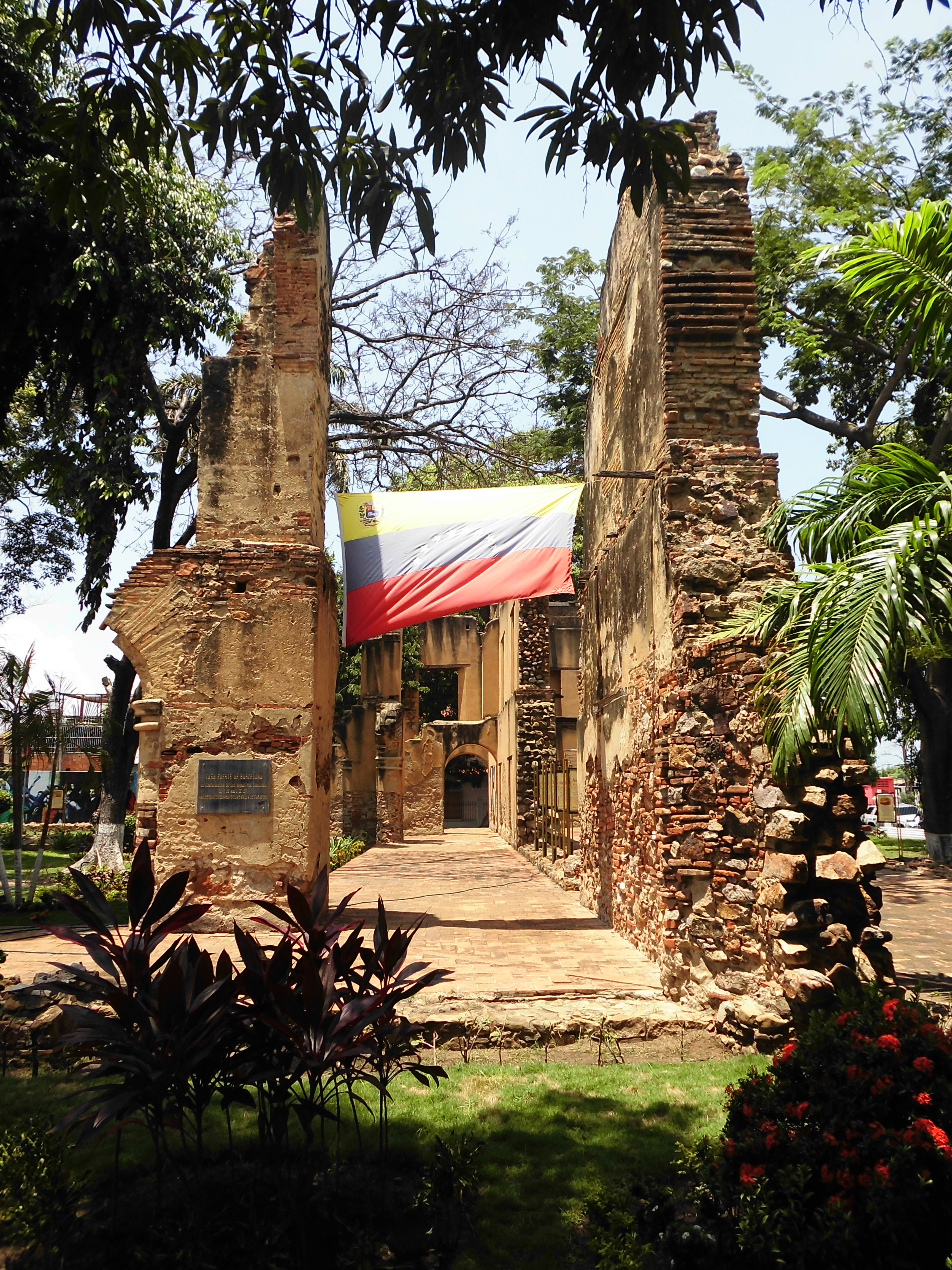 La consolidación de sus ruinas fue concluida el 5 de Mayo de 1971 año sesquicentenario de la Batalla de Carabobo. Avenida Caracas entre Calle Zamora y Avenida 5 de Julio sector Casco Central